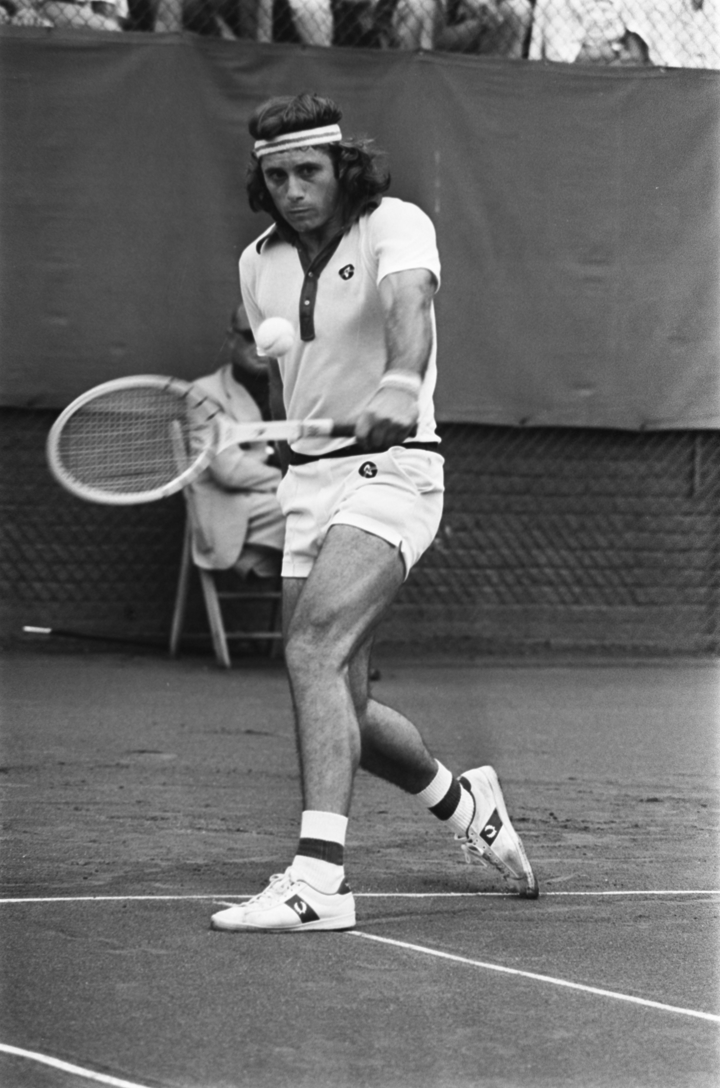 Collectie / Archief : Fotocollectie Anefo Reportage / Serie : Finale tenniskampioenschappen op het Melkhuisje te Hilversum in 1975 Beschrijving : Vilas (Argentinië) in aktie Datum : 20 juli 1975 Locatie : Hilversum, Noord-Holland Trefwoorden : tennis, toernooien Persoonsnaam : Vilas, Guillermo Instellingsnaam : Melkhuisje, 't Fotograaf : Bert Verhoeff / Anefo Auteursrechthebbende : Nationaal Archief Materiaalsoort : Negatief (zwart/wit) Nummer archiefinventaris : bekijk toegang 2.24.01.05 Bestanddeelnummer : 928-0596